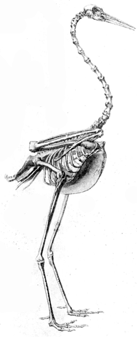 Skelett vom gemeinen Kranich